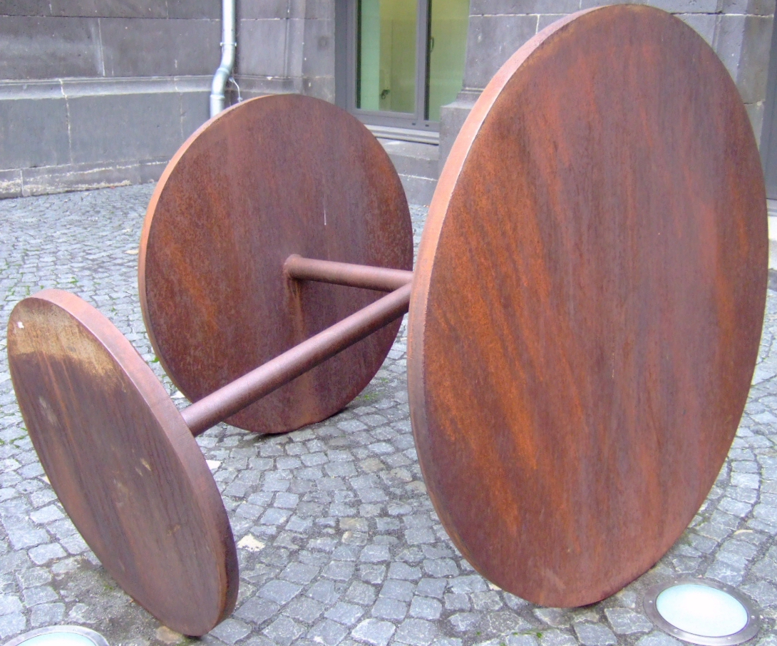 Heinz-Günter Prager: Achse mit drei Scheiben (1986) Material: Eisen Bonn – Rheinisches Landesmuseum (Außenbereich)